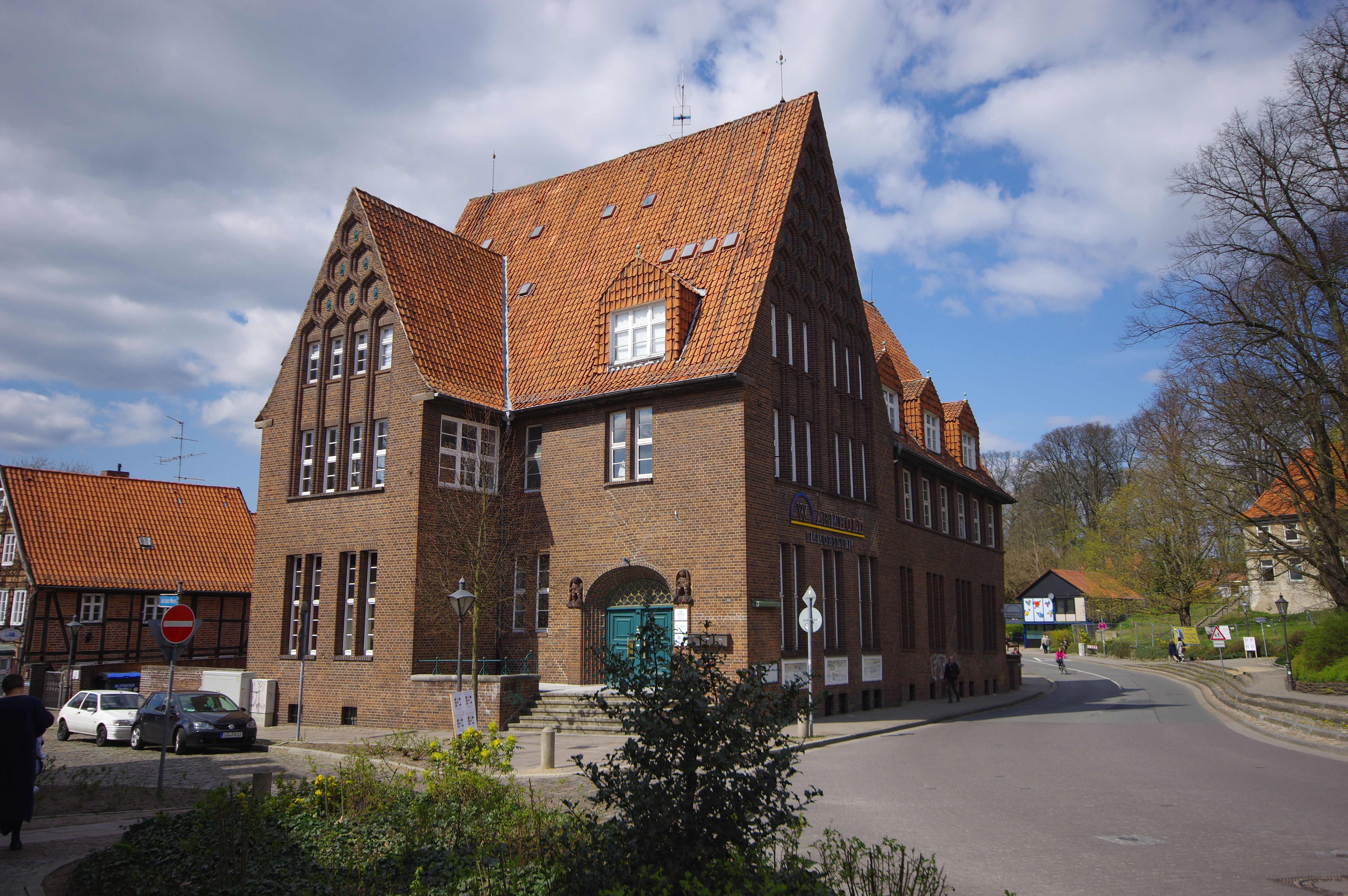 Lüneburg in Niedersachsen. Das Haus (die Hausnummer befindet sich im Namen) in der Straße Auf dem Meere steht unter Denkmalschutz.